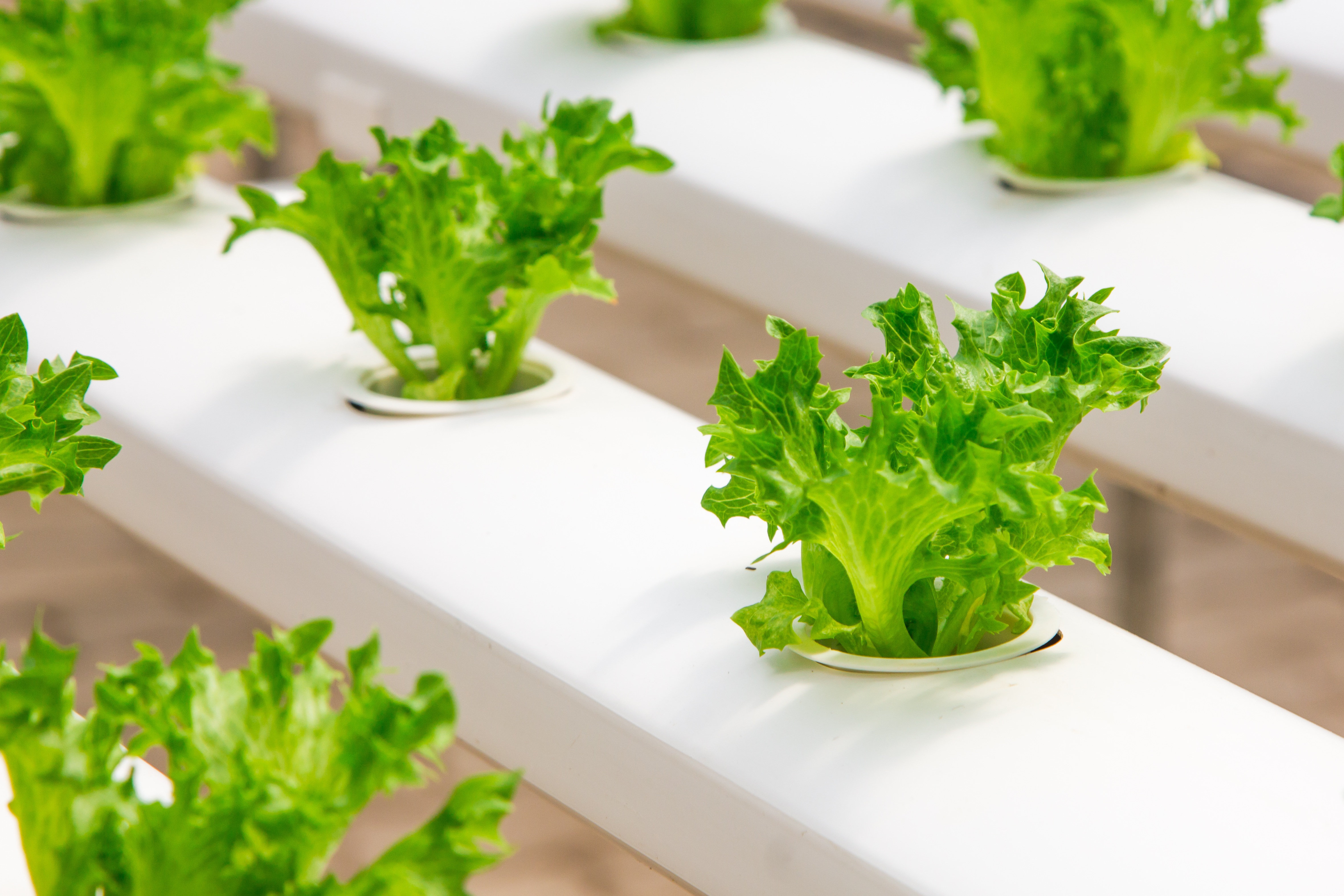 Des salades dans un canal NFT (Nutrient Film Technique)